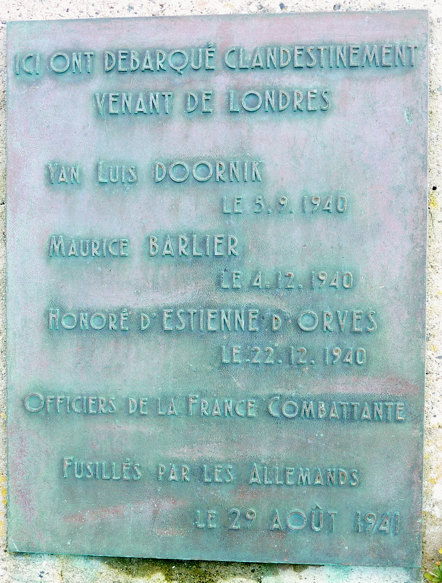 Plogoff : plaque commémorative des débarquements d'Honoré d'Estienne d'Orves, Yan Luis Doornik et Maurice Barlier à Pors Loubous